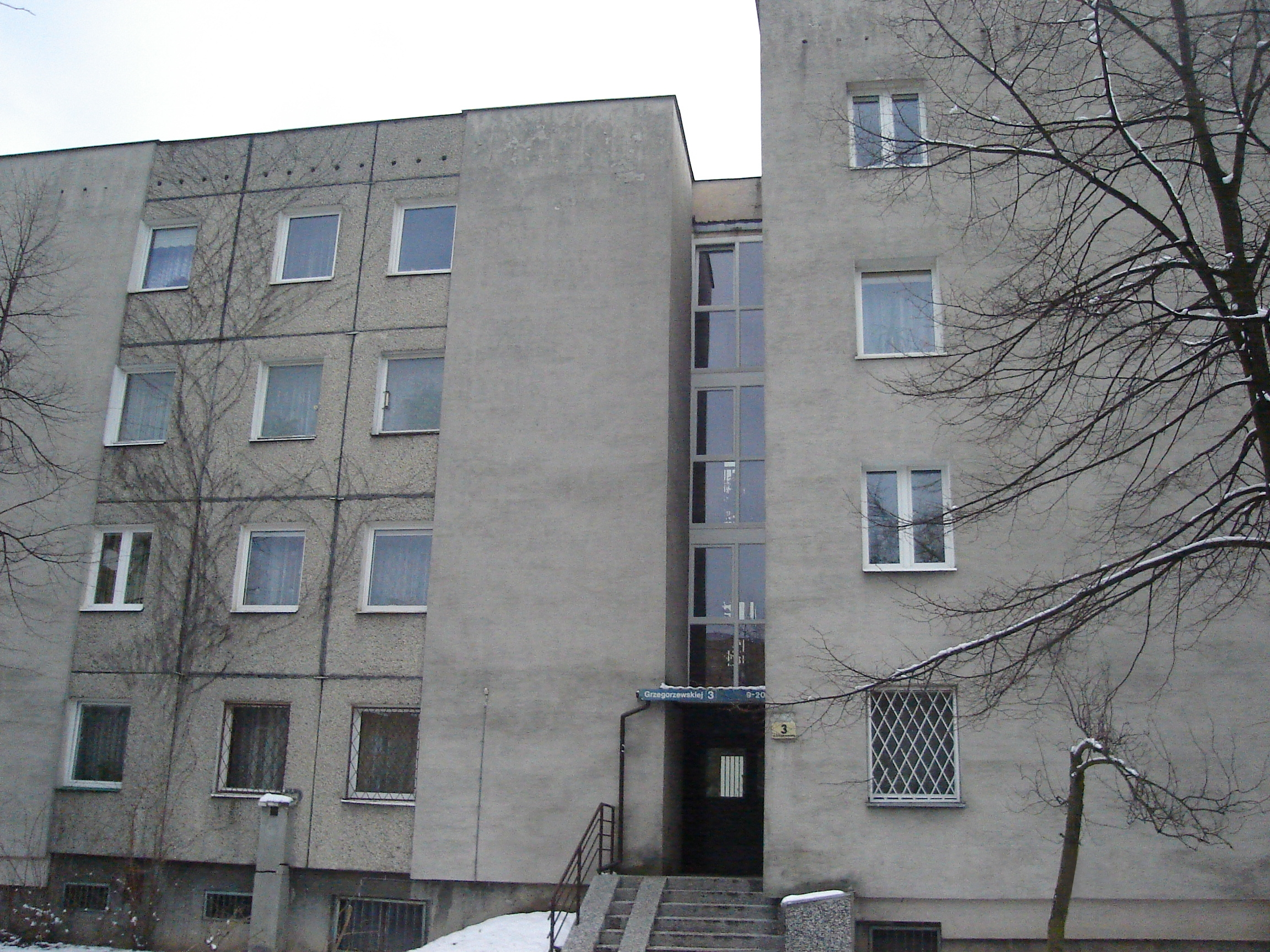 Ulica Marii Grzegorzewskiej 3 Ursynów, filmowa Ulica Alternatywy 4.